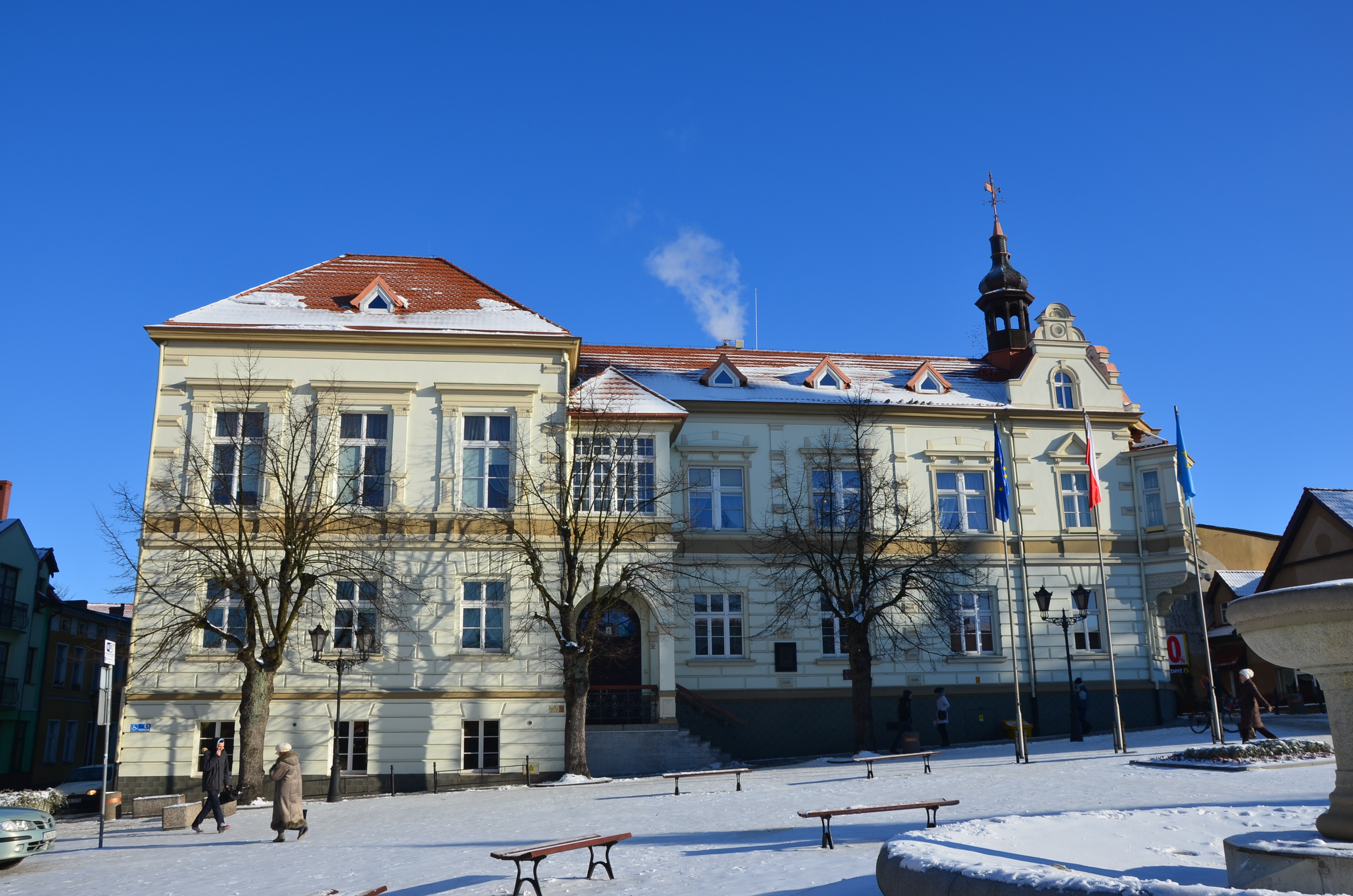 Wałcz, ratusz, 1888-1890, 1936-1937